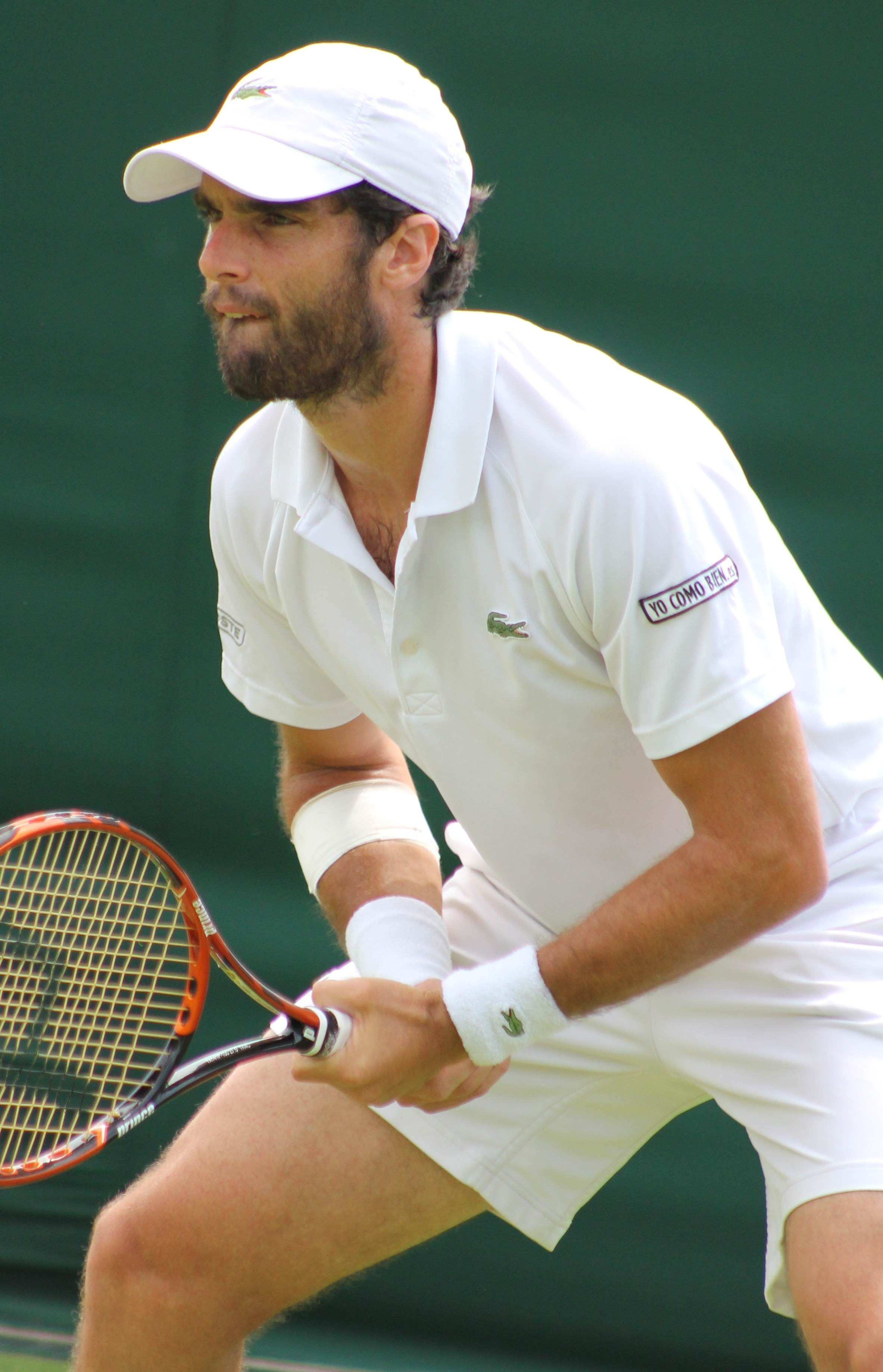 Andujar WM14 (9)